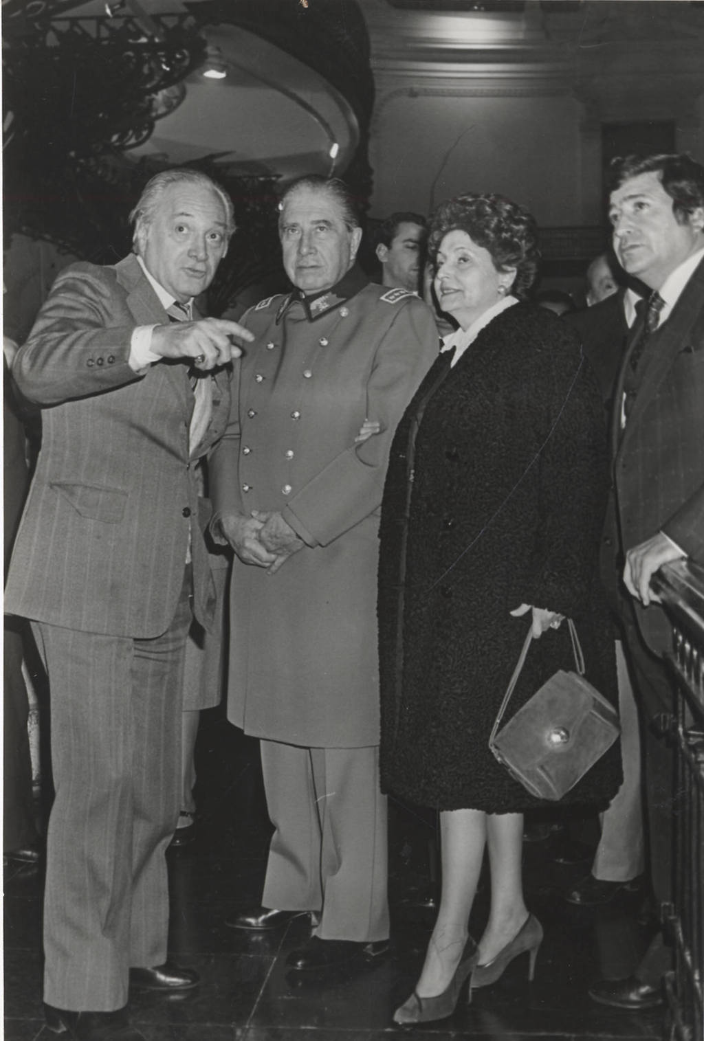 Augusto Pinochet y Lucía Hiriart junto a Enrique Campos Menéndez, en la inauguración de la Exposición "Historia de Chile en la pintura"